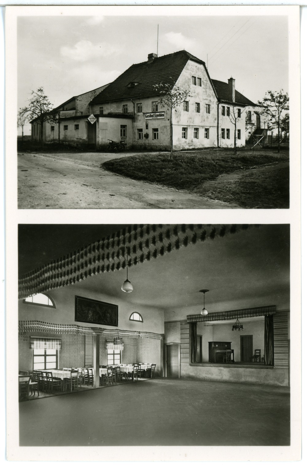 Kmehlen; Gasthof This postcard is from publisher Brück & Sohn in Meißen ( postcard has a unique number 27079 and is available in a higher resolution at the publisher. This images was uploaded in a cooperation project between Wikipedians and the publisher.